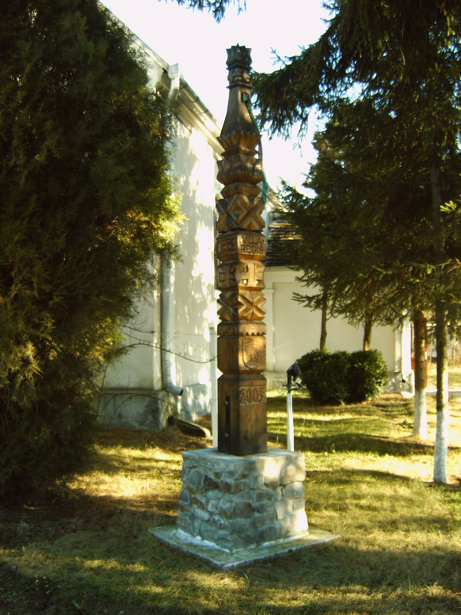 Kopjafa, Magyarkirályfalva. 2003-ban állították fel a falu tiszteletére a királyfalvi magyarok és egyéb támogatók adományozásából a 2003 augusztus 20-án tartandó Szent István ünnepnapok keretén belül